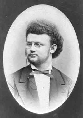 Felix Meyer, Musiker